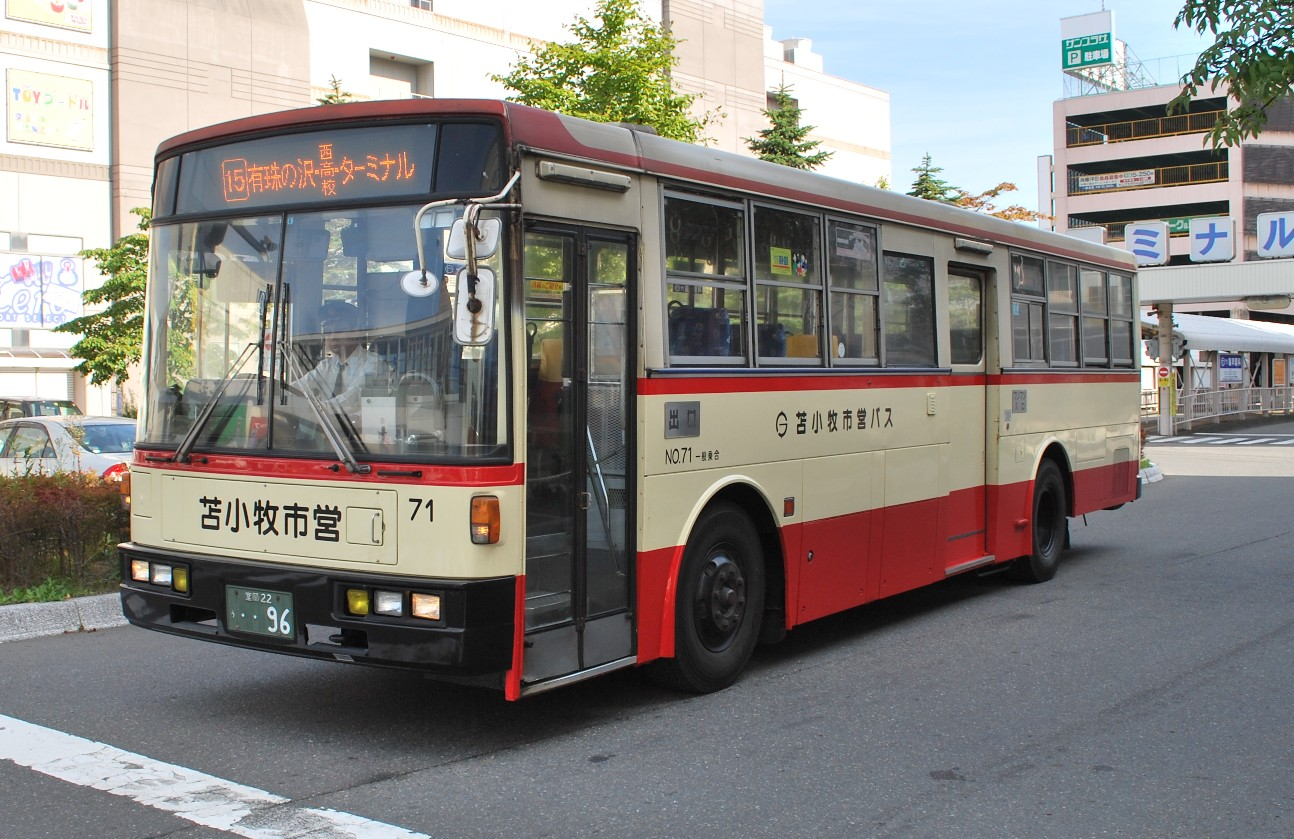 苫小牧市営バス71号車 北海道苫小牧市苫小牧駅近隣の公道上で撮影